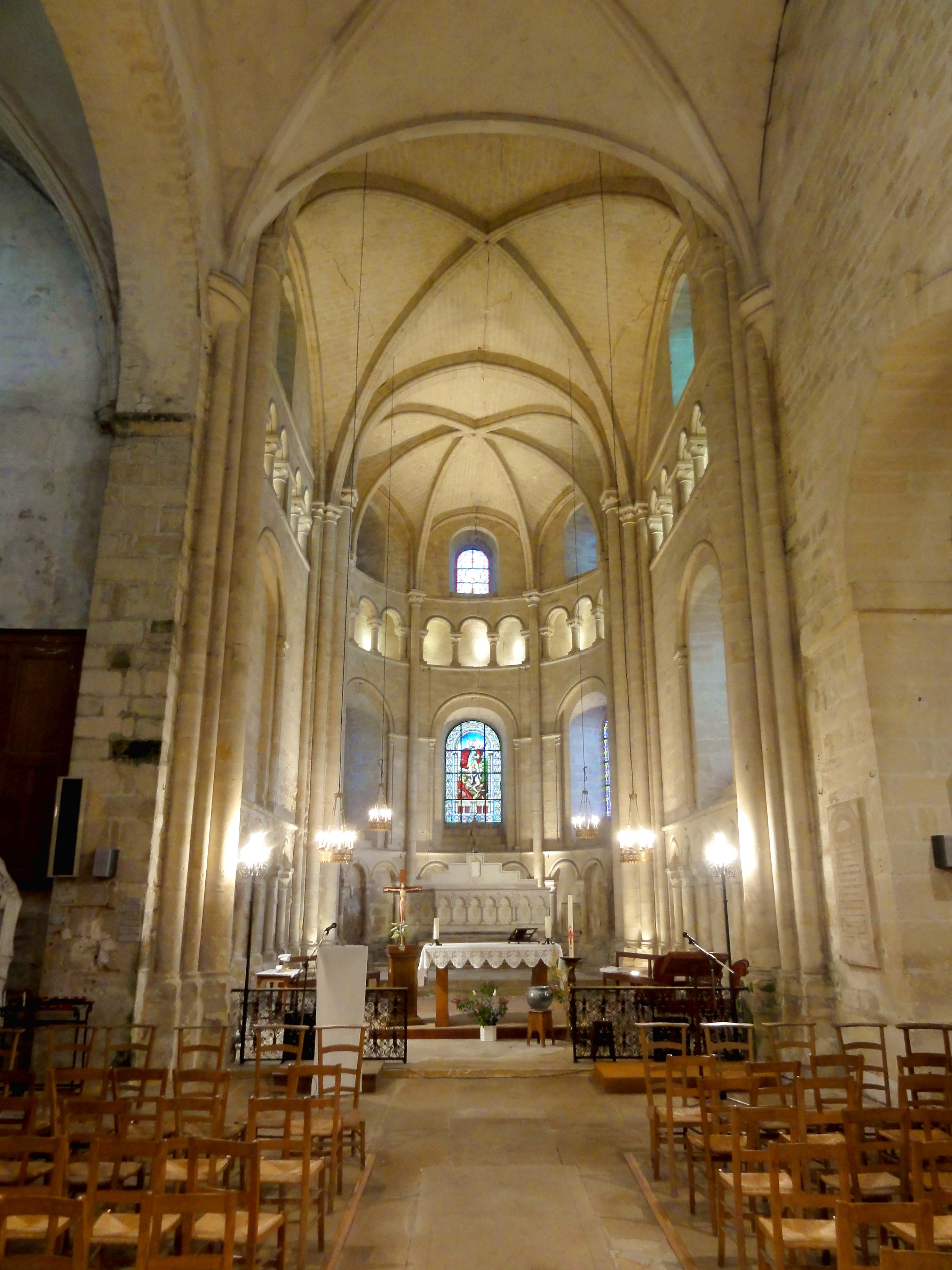 Intérieur de l'église - voir titre.